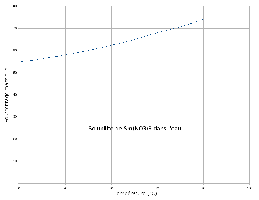 Solubilité de Sm(NO3)3 dans l'eau en fonction de la température.